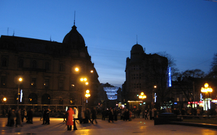 Проспект Свободы (Львов) вечером